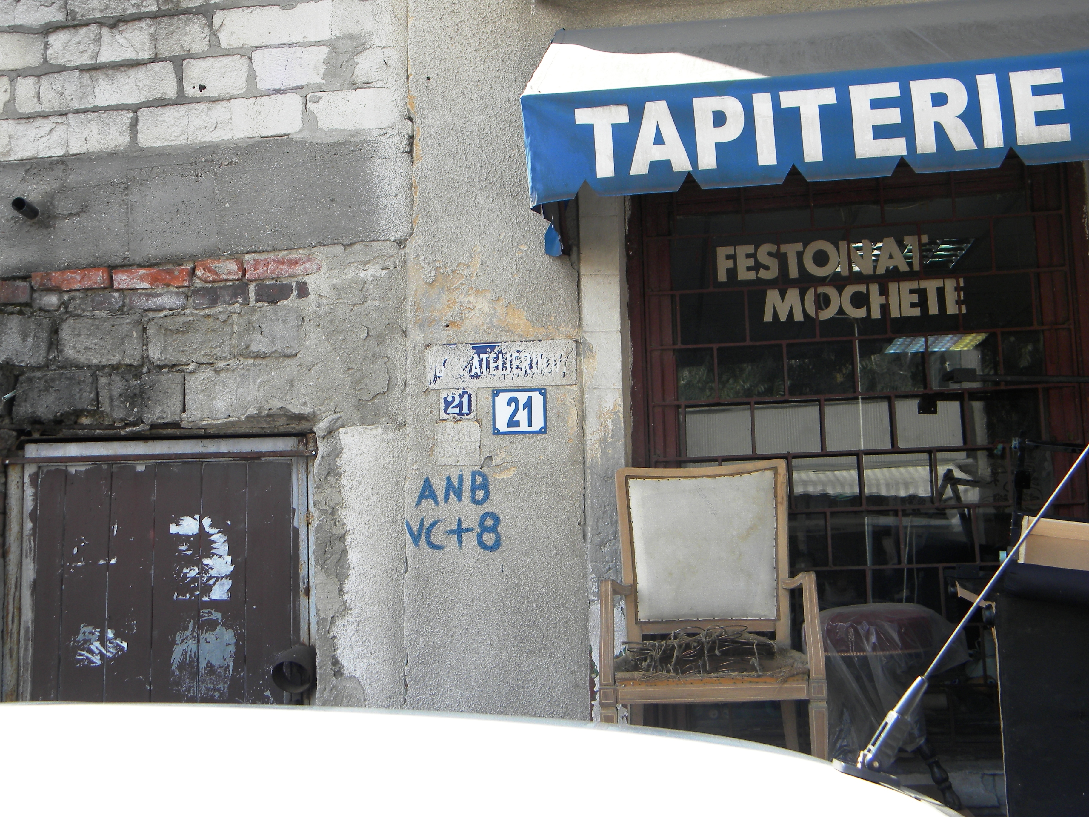 Bucuresti, Romania, Str. Atelierului nr. 21; B-II-m-B-18012 (detaliu 1)